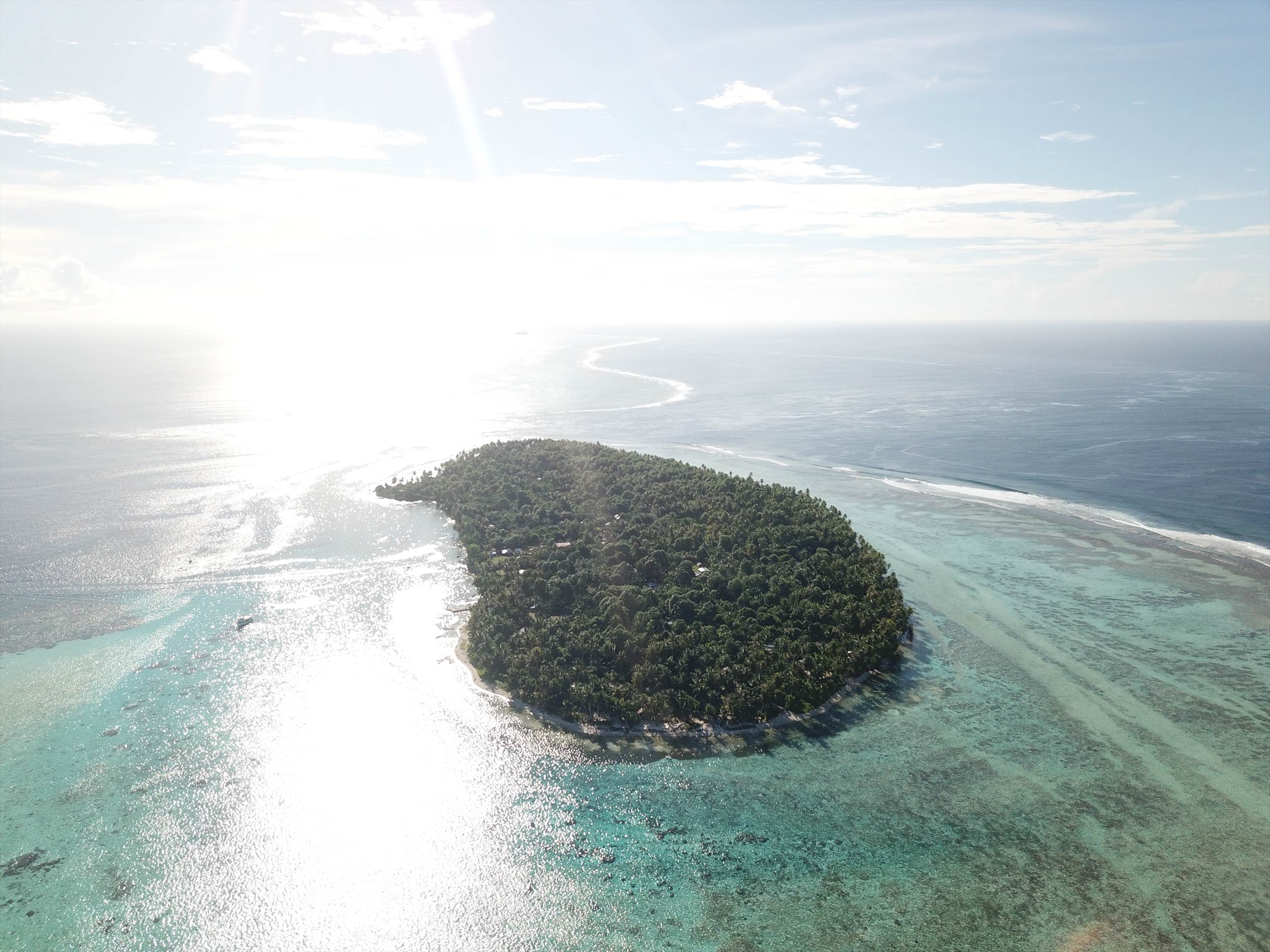 Chuuk piis island